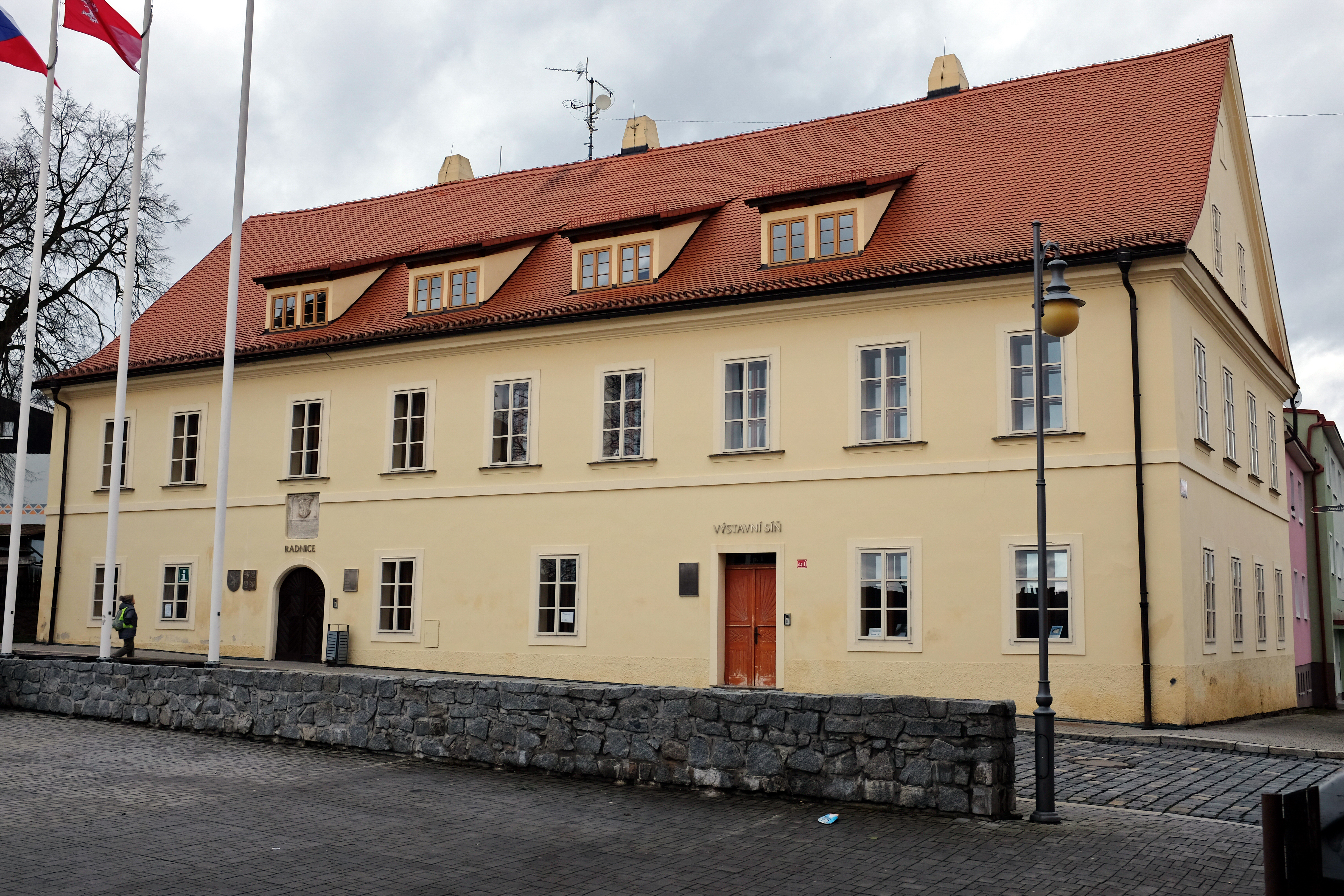 Stará radnice, Maxima Gorkého 1/16, Kynšperk nad Ohří.